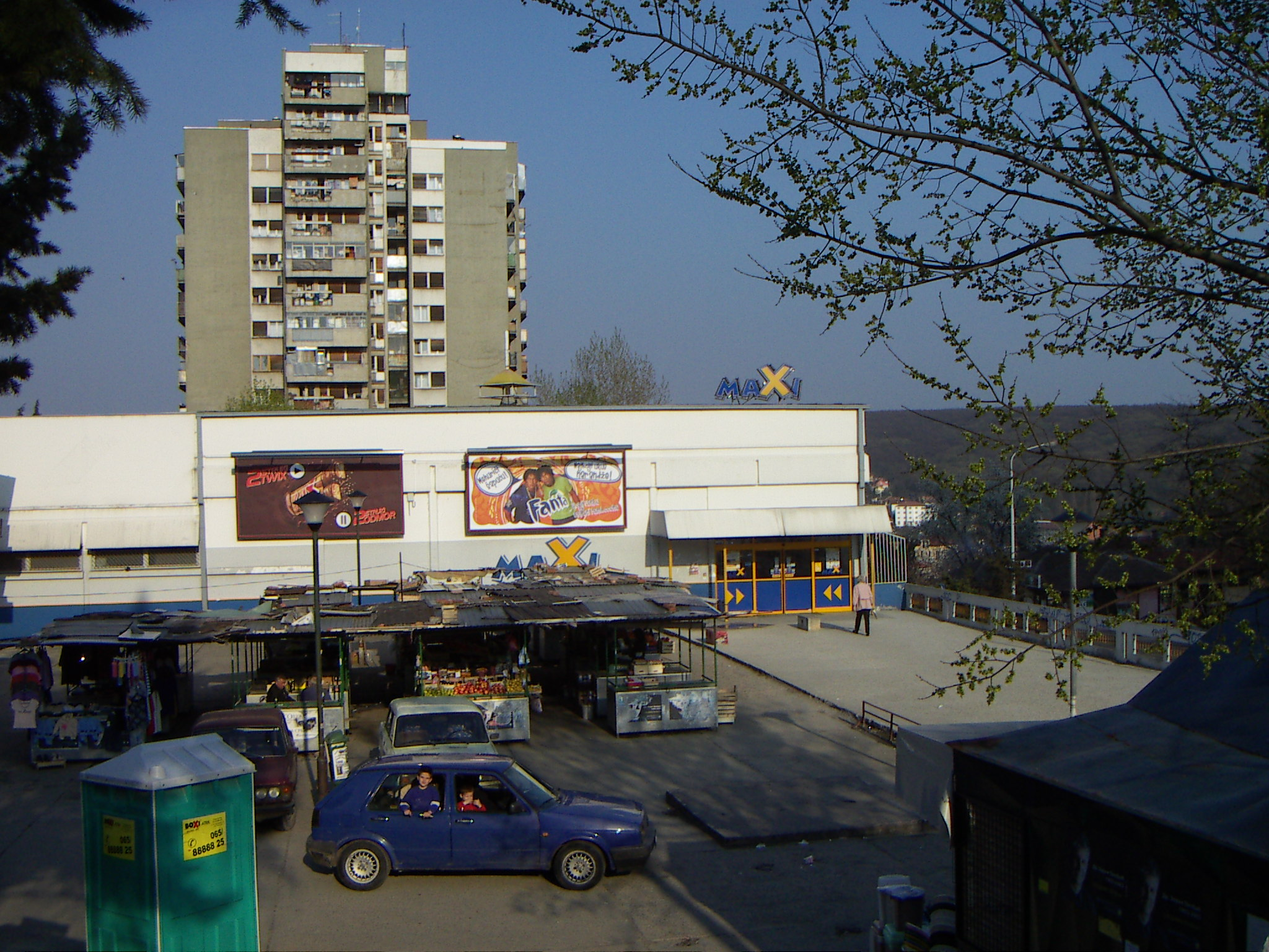 Раковица - Центар